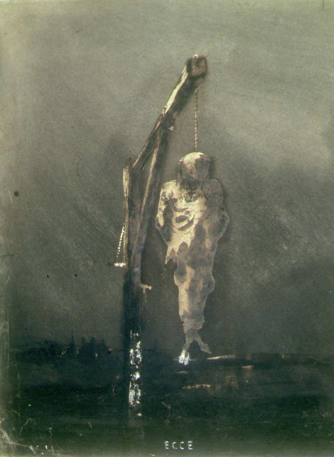 Joe Seager: Le Pendu (« Ecce »). Dessin de 1854. Maison de Victor Hugo, Paris.